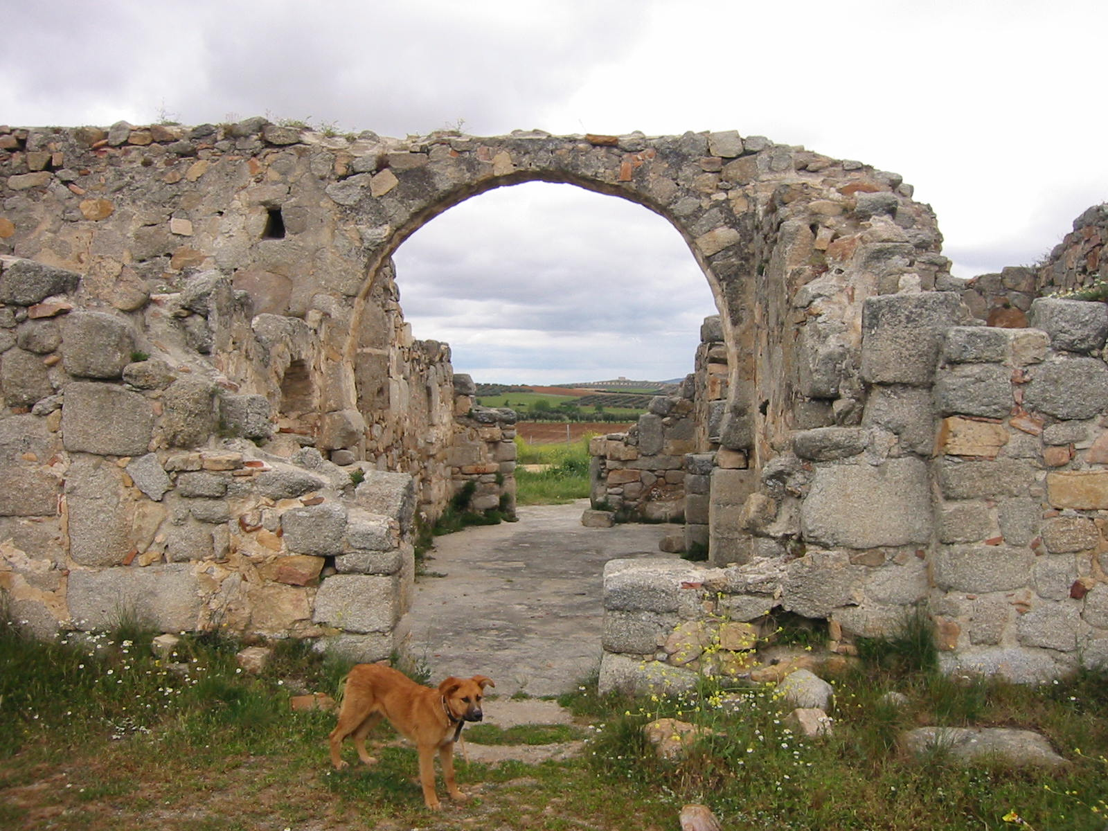 Iglesia Visigoda de San Pedro de la Mata, Casalgordo (Toledo)